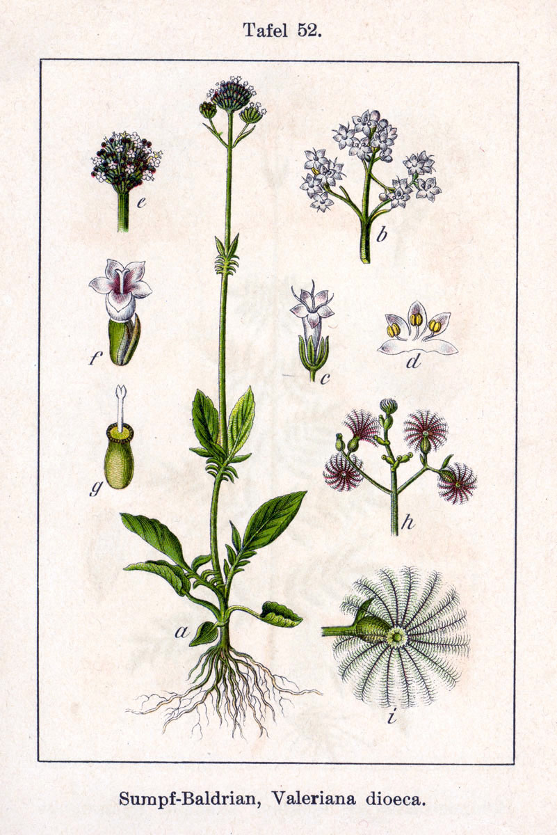 Valeriana dioica L. Original Description Sumpf-Baldrian, Valeriana dioeca